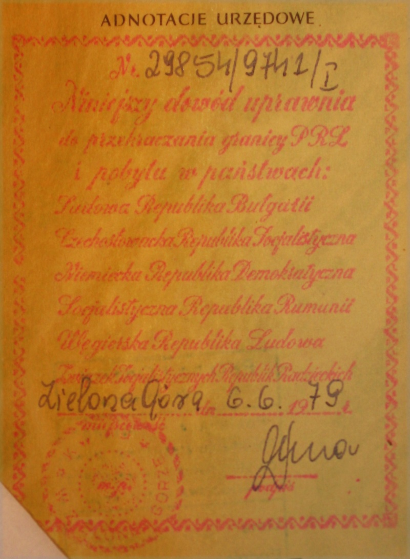 Stempel w dowodzie osobistym z czasów PRL, uprawniający do wyjazdu do demoludów. Tego rodzaju stemple zastąpiły w II połowie lat 70. inne, które w pierwszej połowie dekady 70. upoważniały do wyjazdu do NRD.